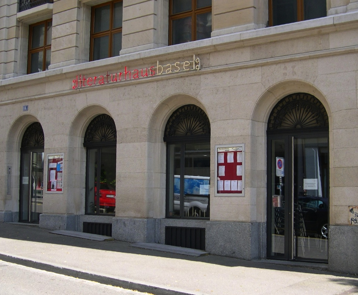 Gebäude des Basler Literaturhauses an der Barfüssergasse.